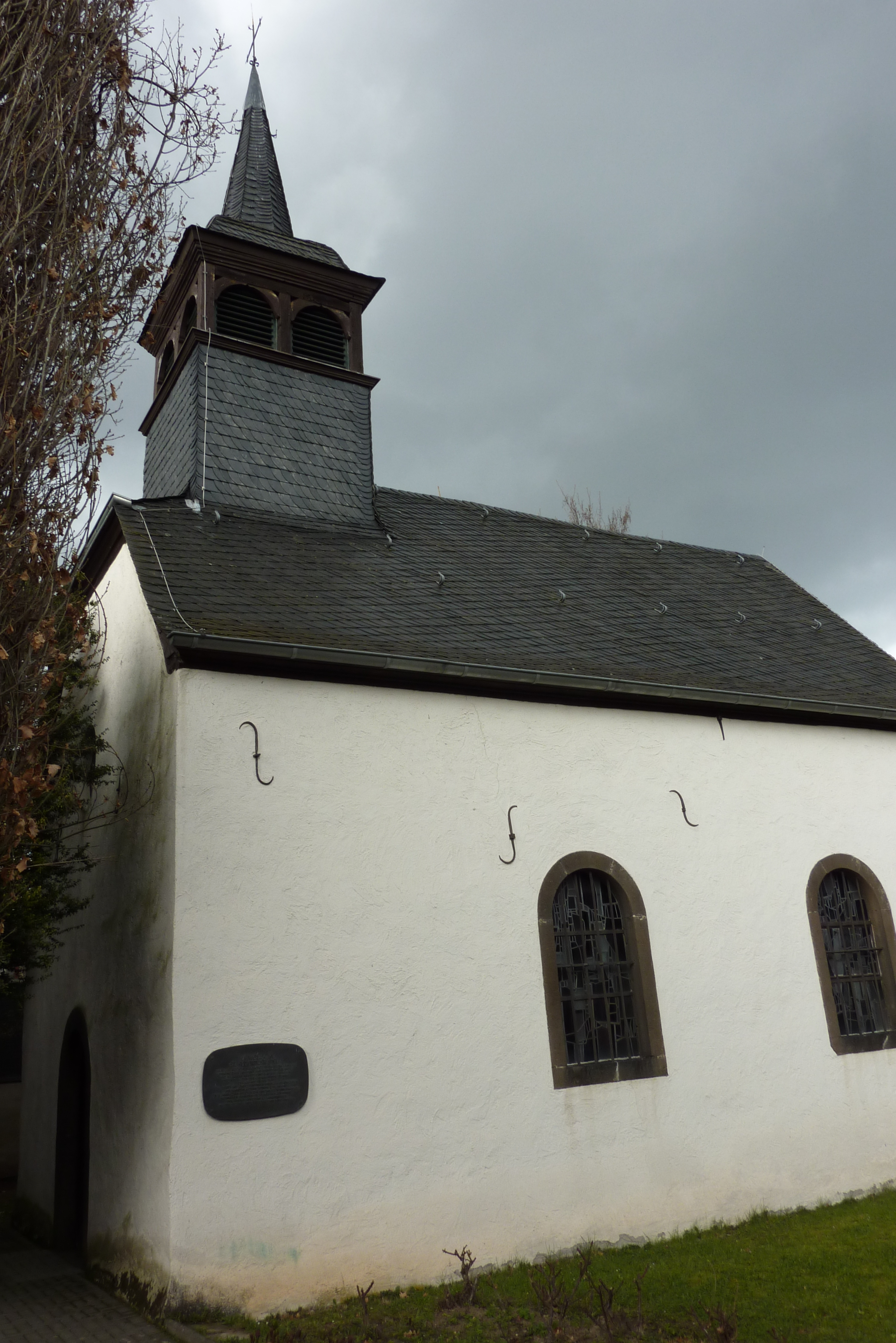 Ehlingen, Kapelle St. Hubertus, von Westen